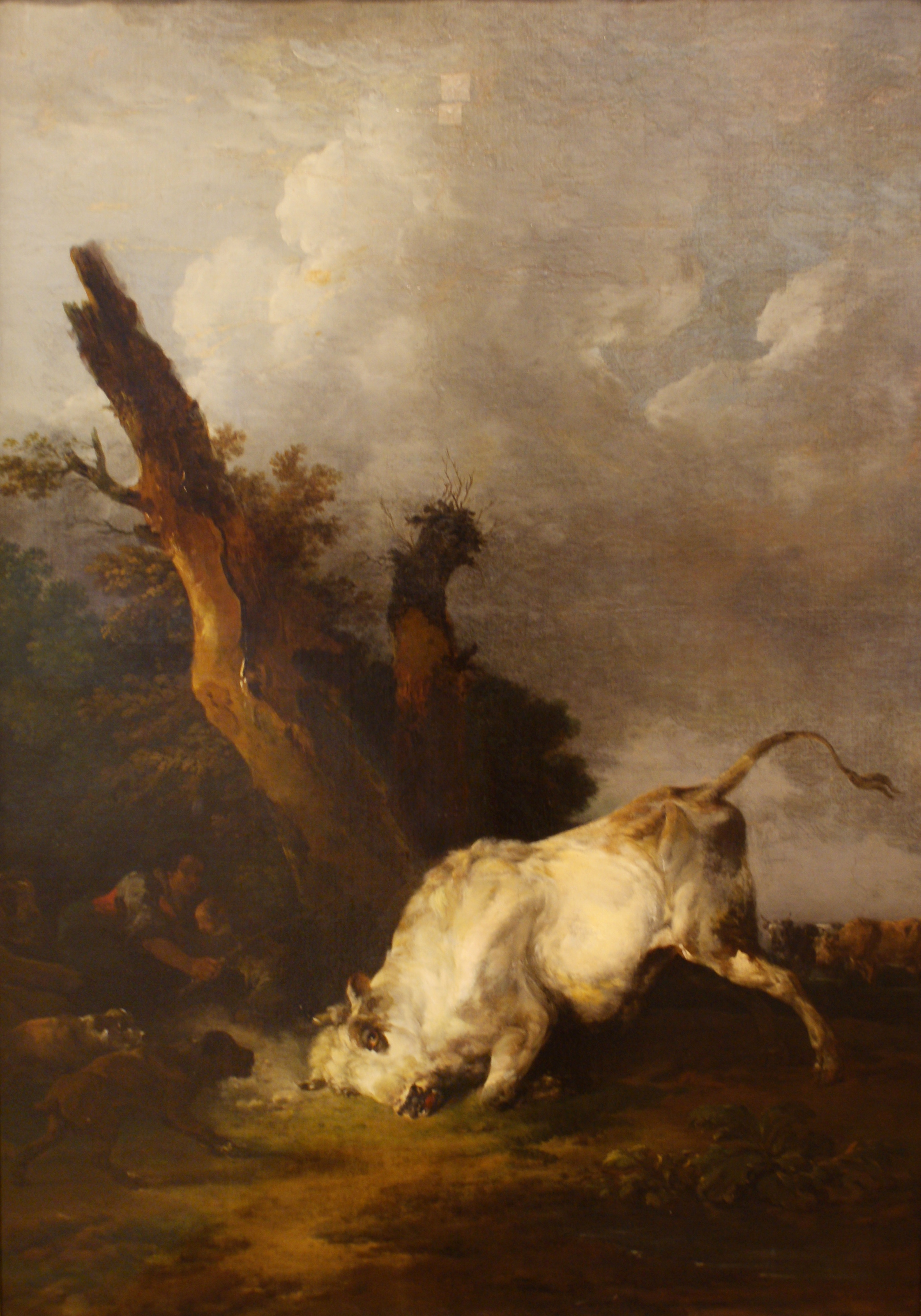 Пейзаж з быком